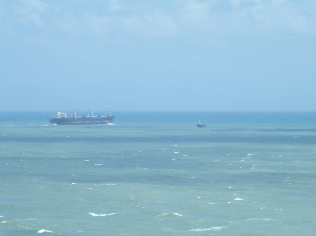 达濠东面的大海。